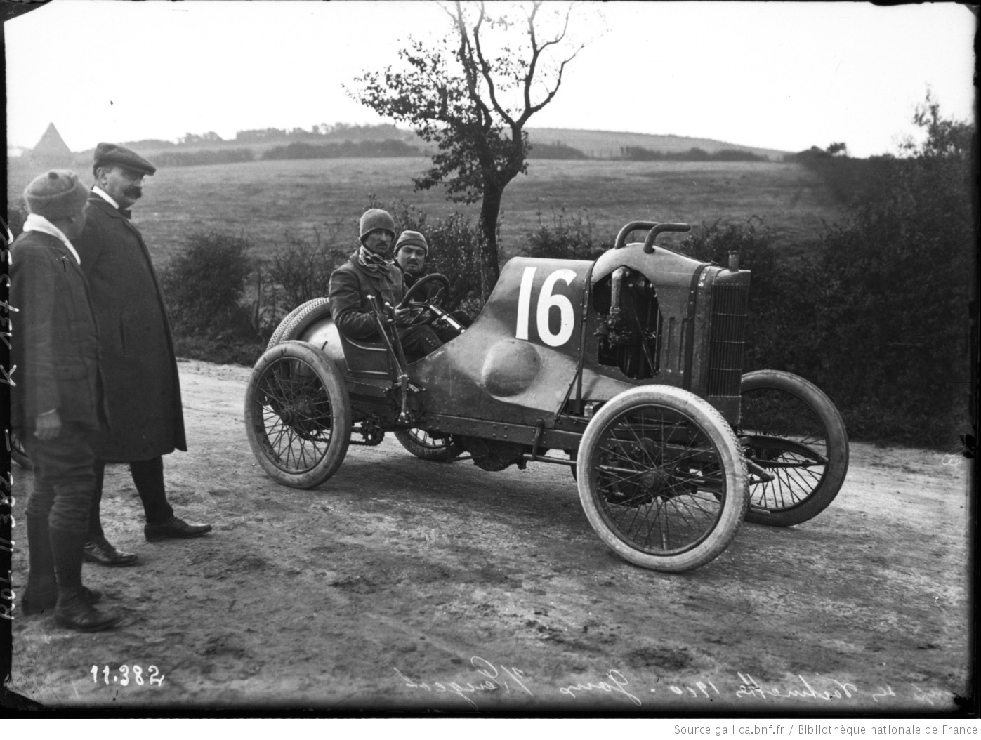 [18 septembre], Boulogne-sur-Mer, coupe des voiturettes 1910, Goux sur Peugeot [avec son mécanicien] : [photographie de presse] / [Agence Rol]